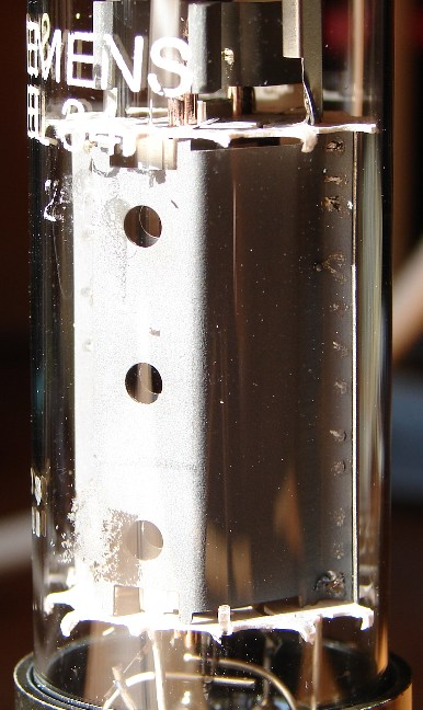 Siemens EL34 mit Strahlblech (Beam Power Version)